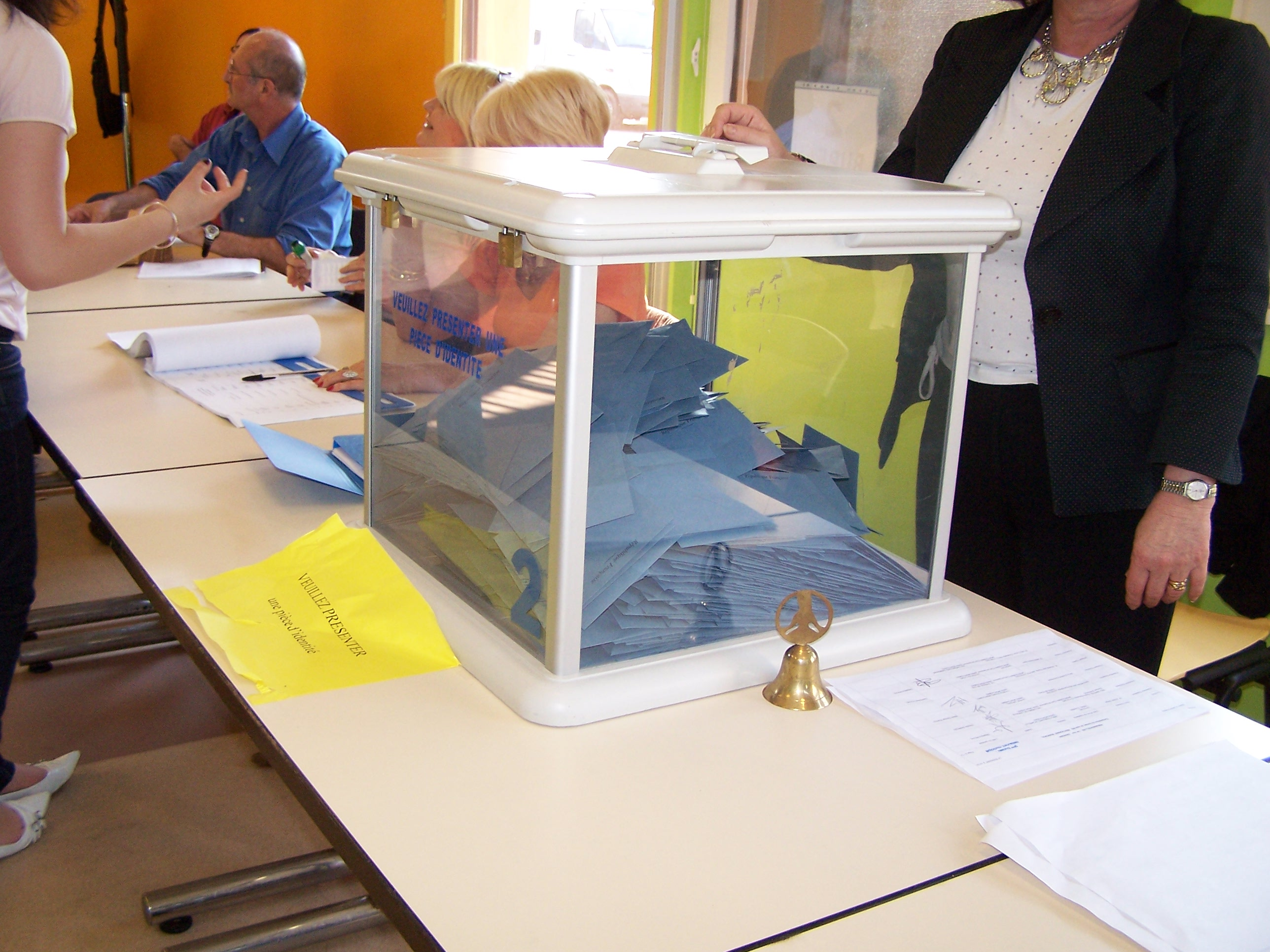 Urne lors de l'élection présidentielle 2007 1er tour